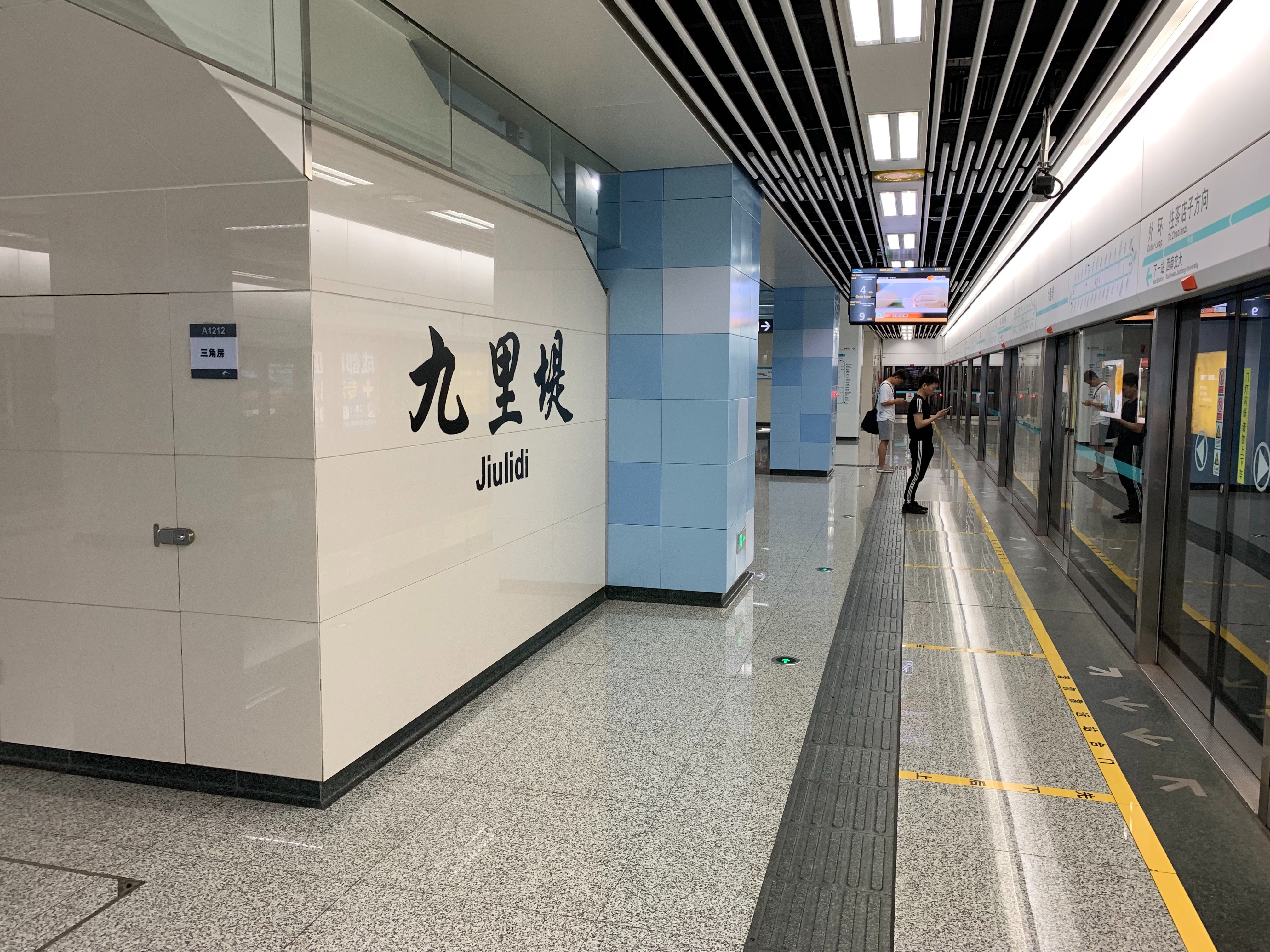 成都地铁九里堤站